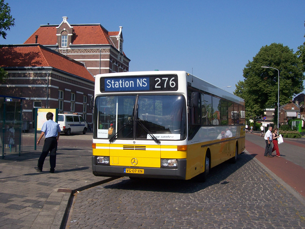 Station Tiel met oud-Connexion bus